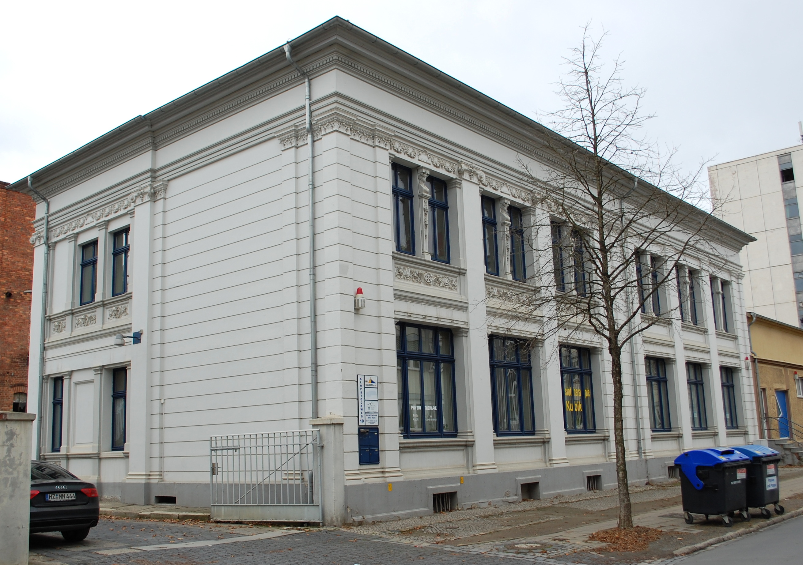 Haus Klopstockweg 10 in Quedlinburg